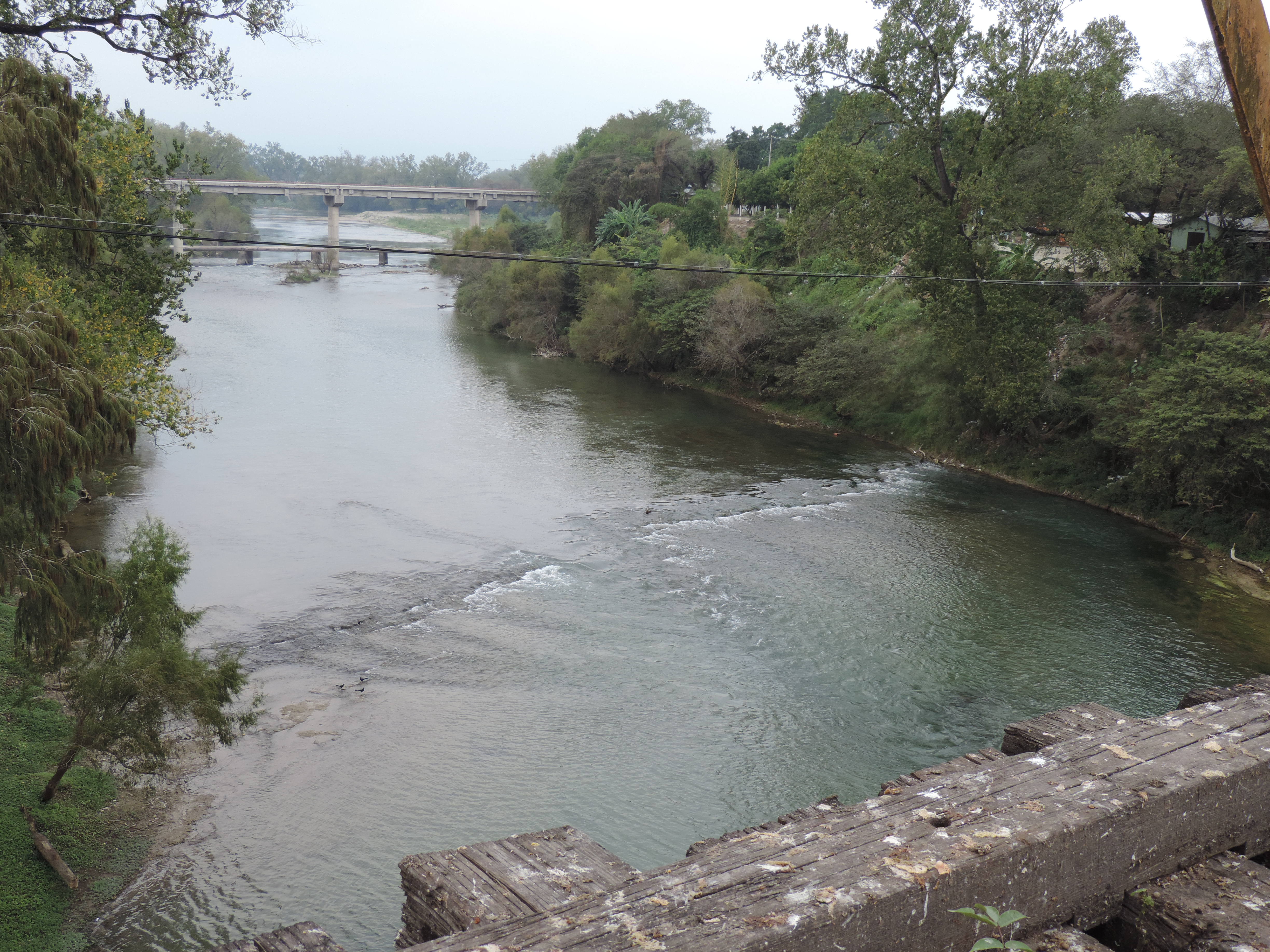 Fotografía tomada desde el puente del ferrocarril del Río Guayalejo, en El Limon, Mpio. El Mante, Tamaulipas.